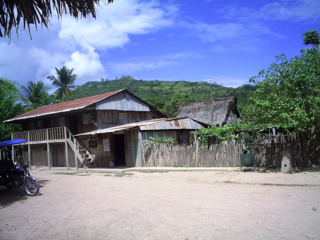 Tipica casa Pilluanina